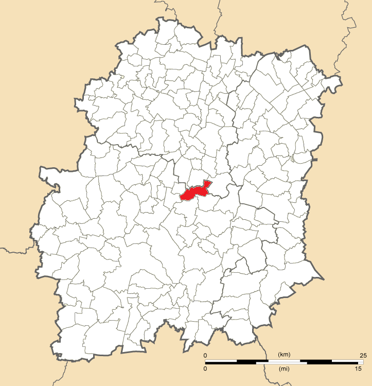 Carte de position de Lardy en Essonne (91)